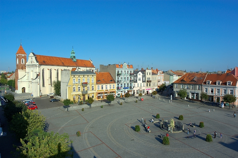 Rynek Gniezna z lotu ptaka